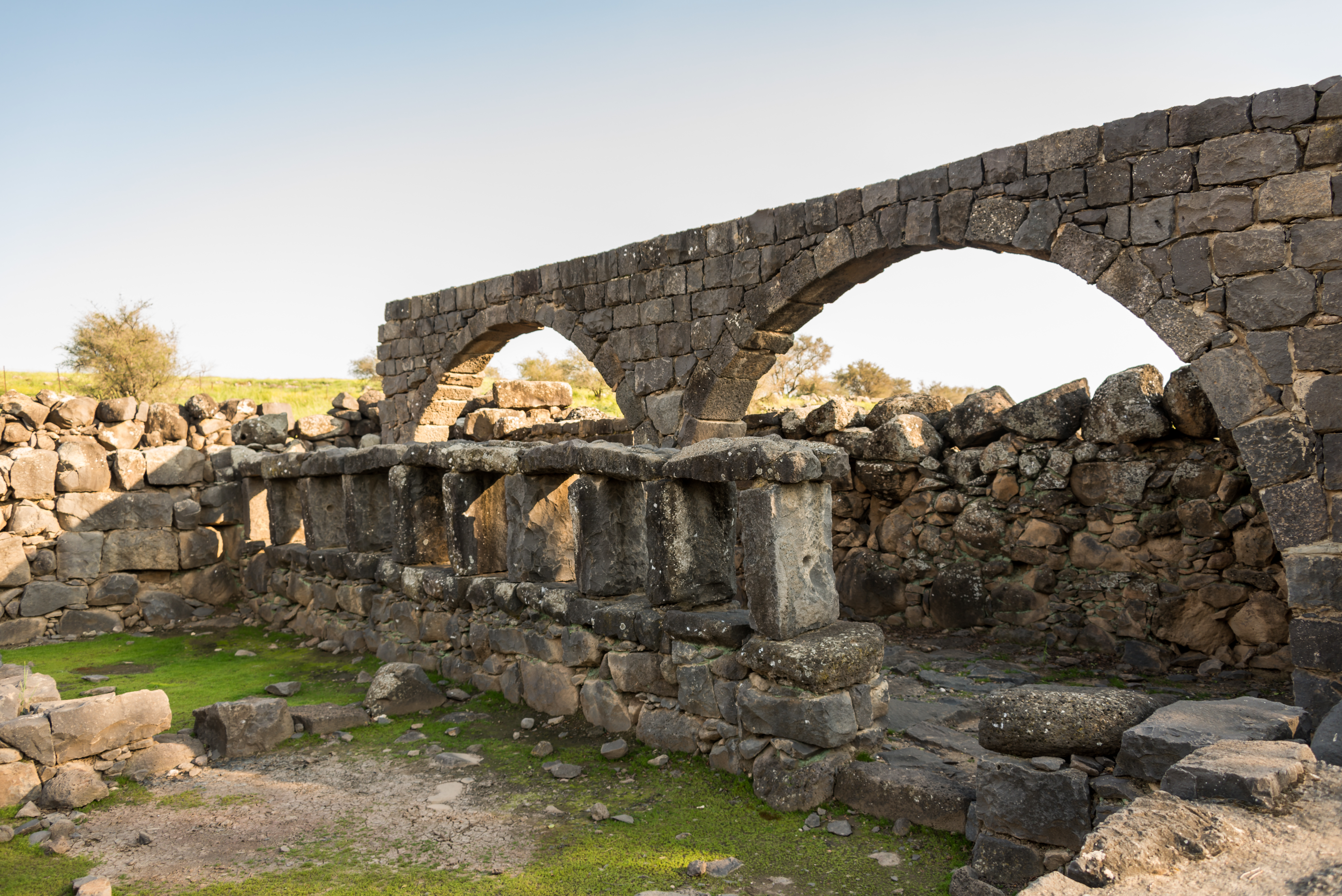 כורזים הוא יישוב קדום, שעמד על תילו מתחילת המאה הראשונה לספירה ועד המאה השמינית. הוא מוזכר בתלמוד ובברית החדשה. הוא זוהה באתר ארכאולוגי שנקרא ח'רבת כראזה, כ-4 קילומטר צפונית לכפר נחום. תקופת הפריחה של העיר הייתה כנראה בסוף המאה השלישית ובתחילת הרביעית. הרמה הבזלתית שהאתר נמצא בה קרויה על שמו רמת כורזים. כיום האתר הוא גן לאומי.